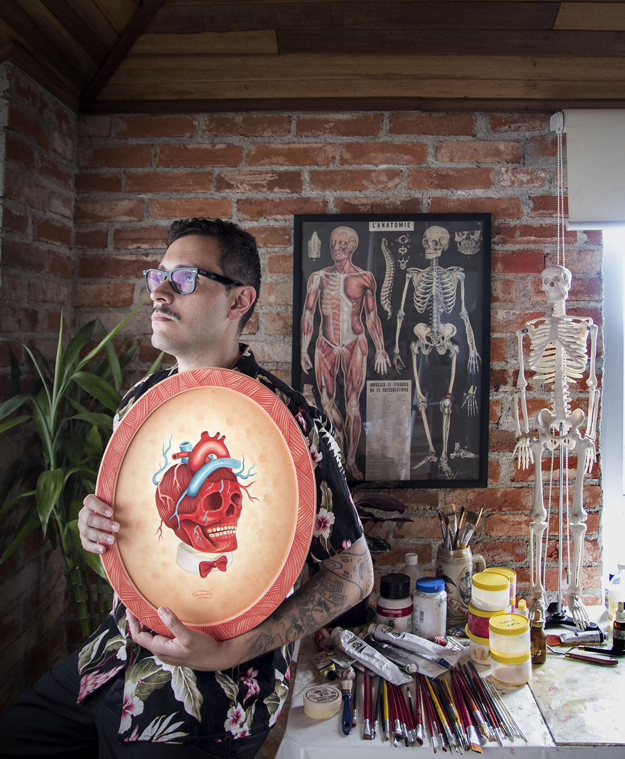 Rafael Silveira